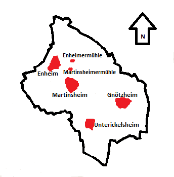 Lage der Ortsteile im Martinsheimer Gemeindegebiet, Legende: schwarz- Gemeinde Martinsheim, blau- Fluss Main, Seen, rot- besiedelte Fläche